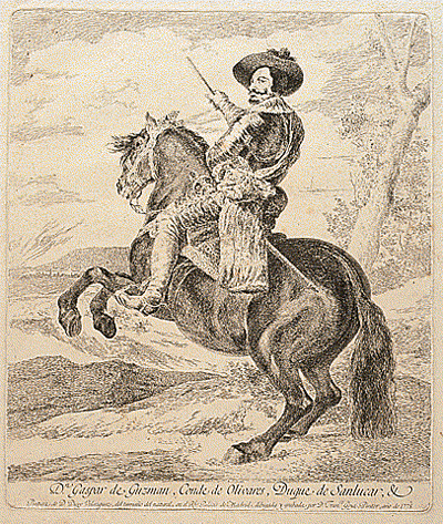 Grabado del retrato ecuestre de Gaspar de Guzmán, realizado por Diego Velázquez.